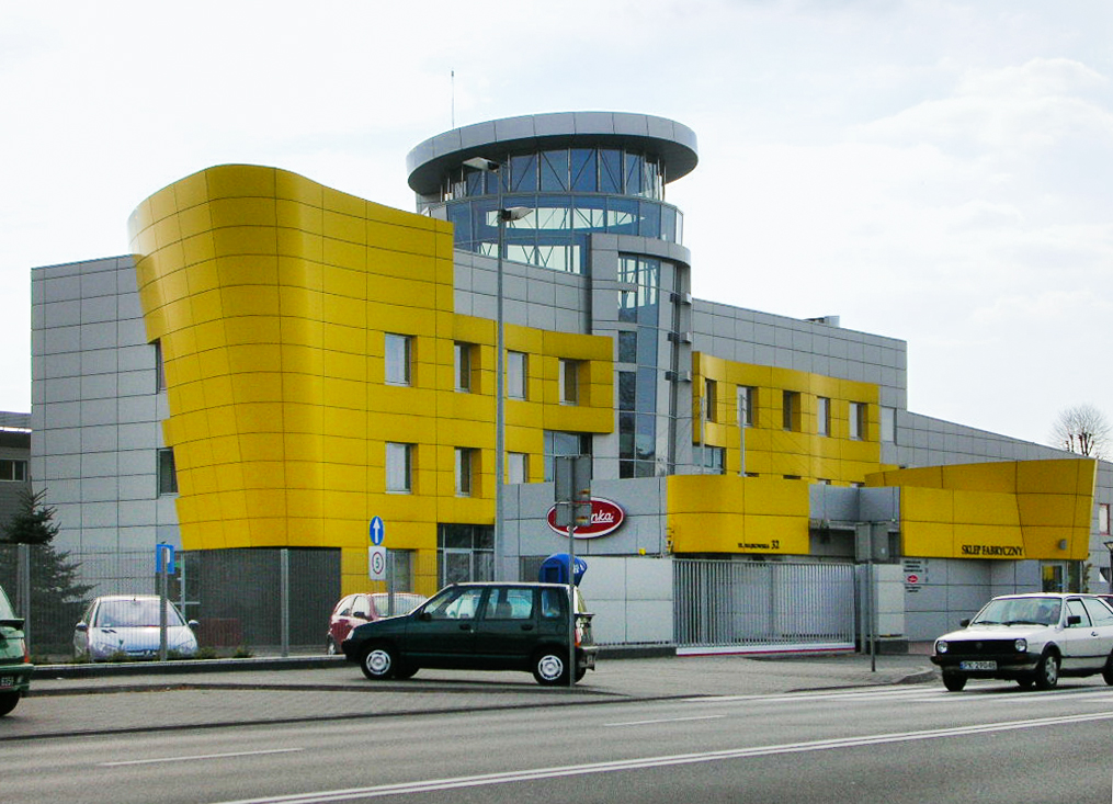 Kalisz - fabryka Pieczywa Culierniczego "Kaliszanka". Autor : Bartek Wawraszko (Bast)